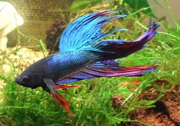 Veil-tail con qualche leggera caratteristica Crown-tail